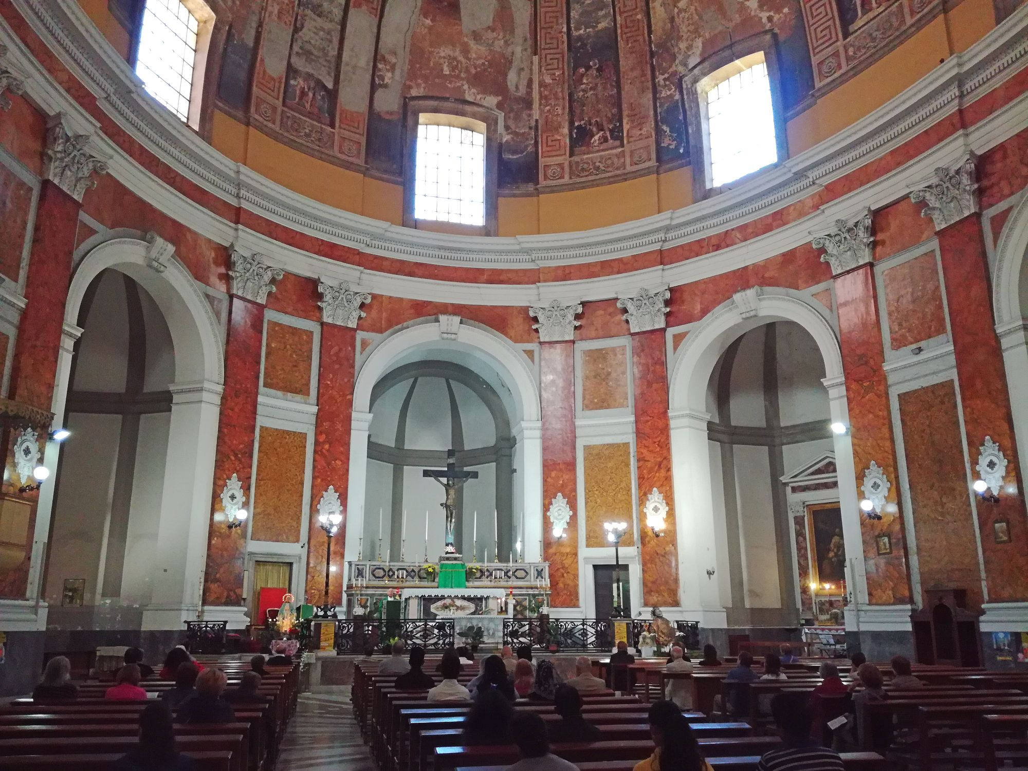 Interno di San Carlo all'Arena di Napoli